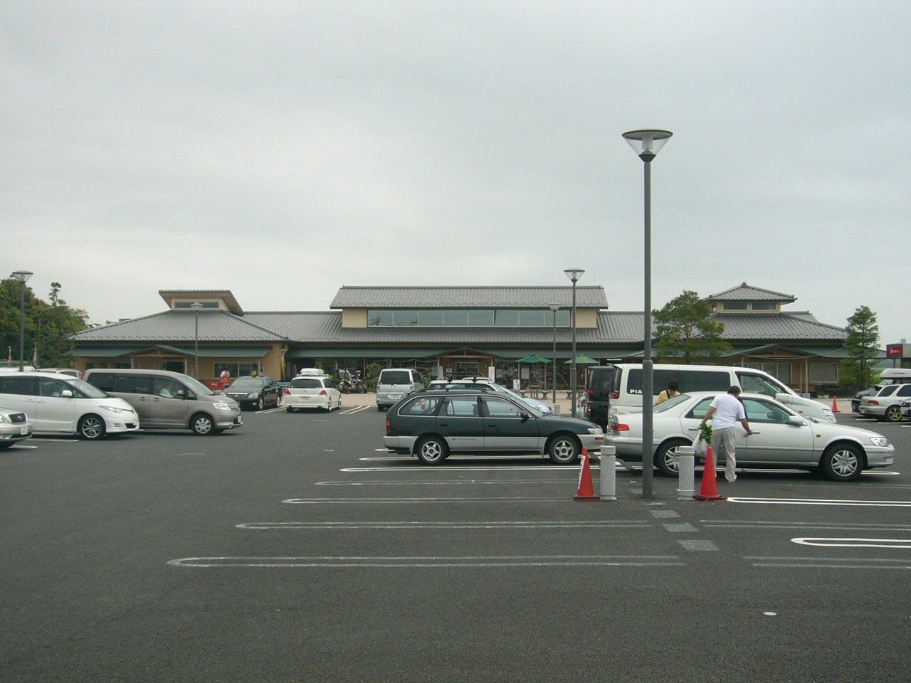 Michinoeki Orai Hasunuma (道の駅オライはすぬま Chiba)